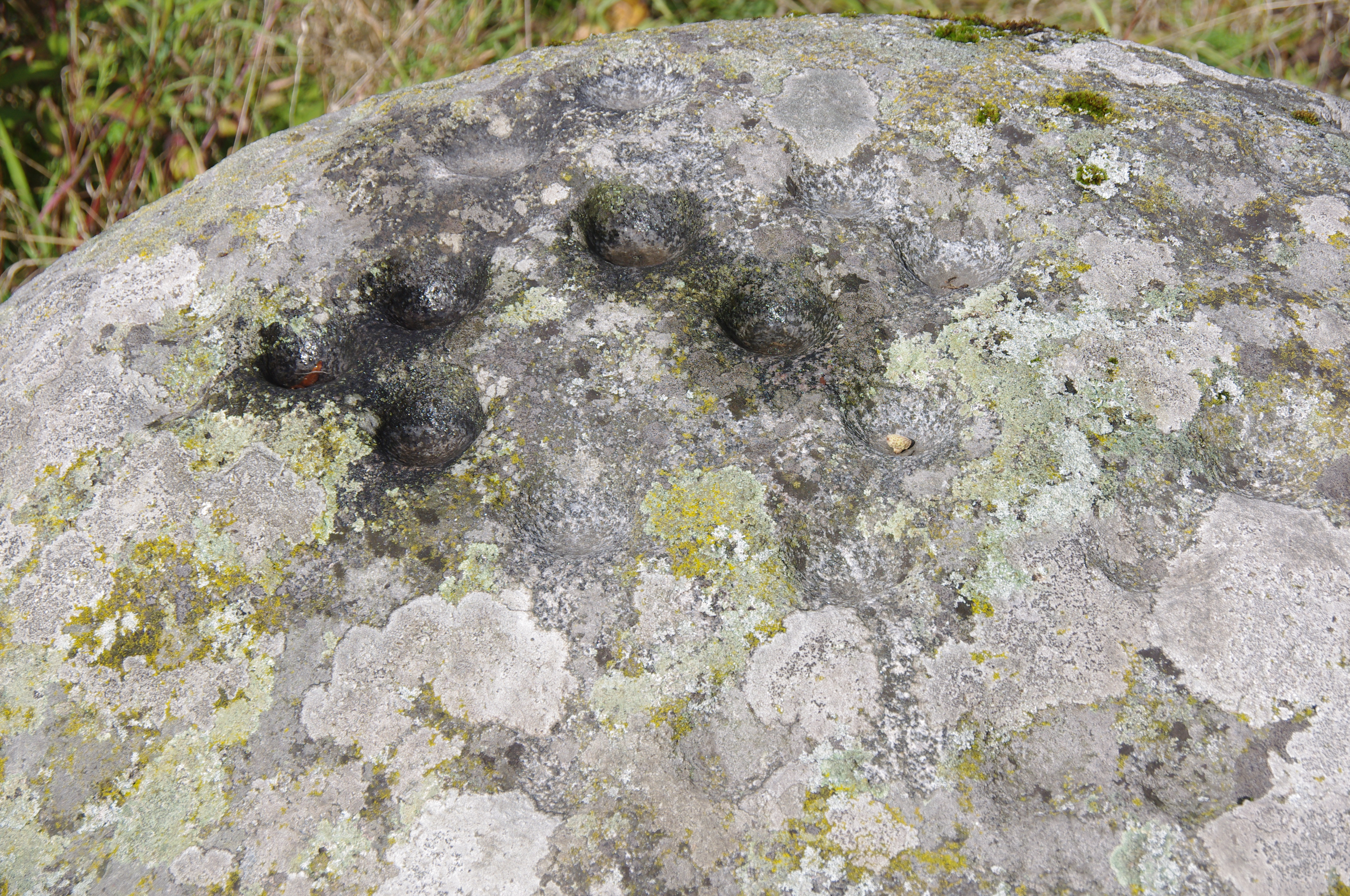 Kultusekivi